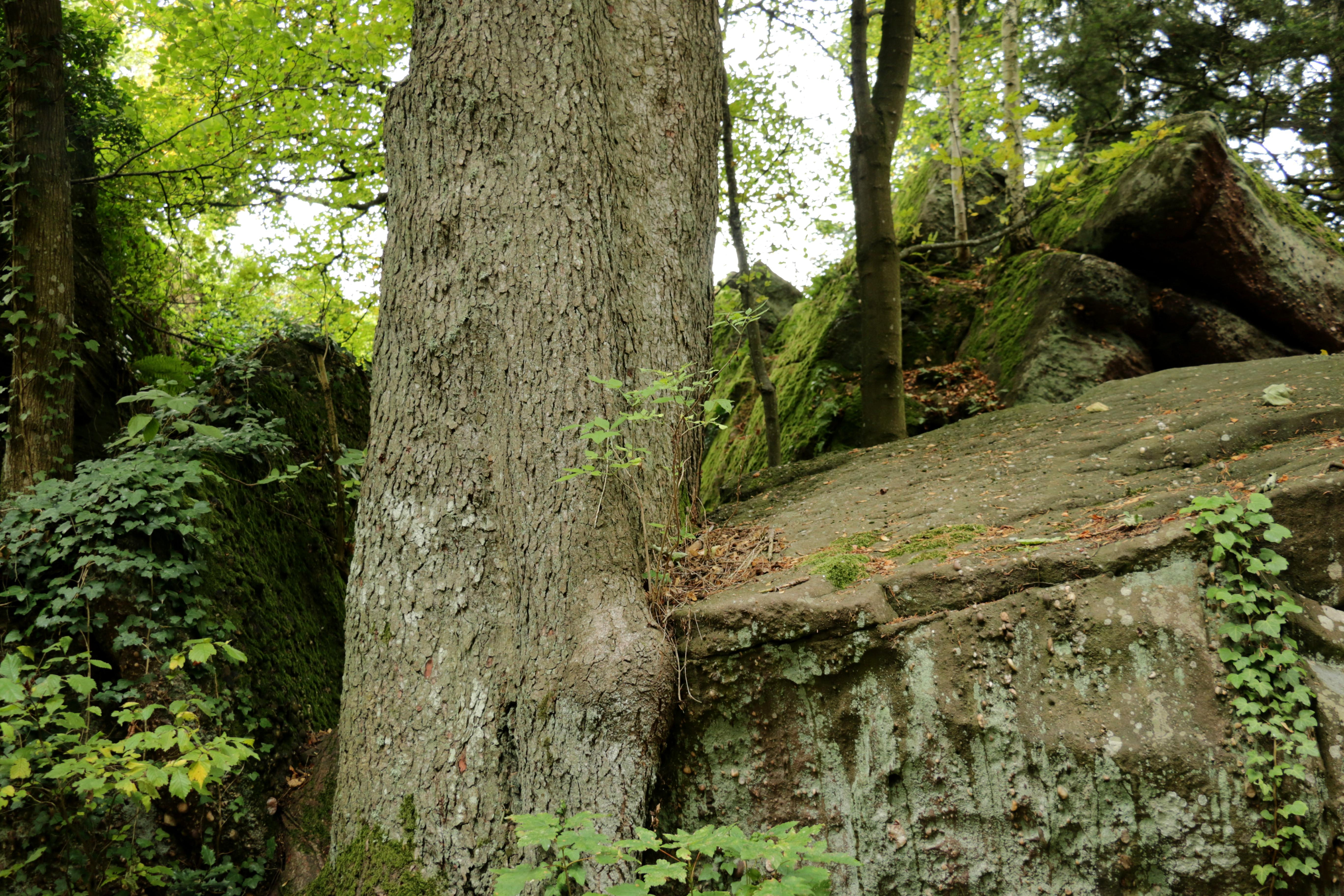 Buntsandsteinfelsen am Mont Sainte Odile (Elsaß).